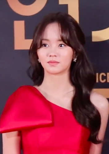 191231 KBS연기대상 김소현.